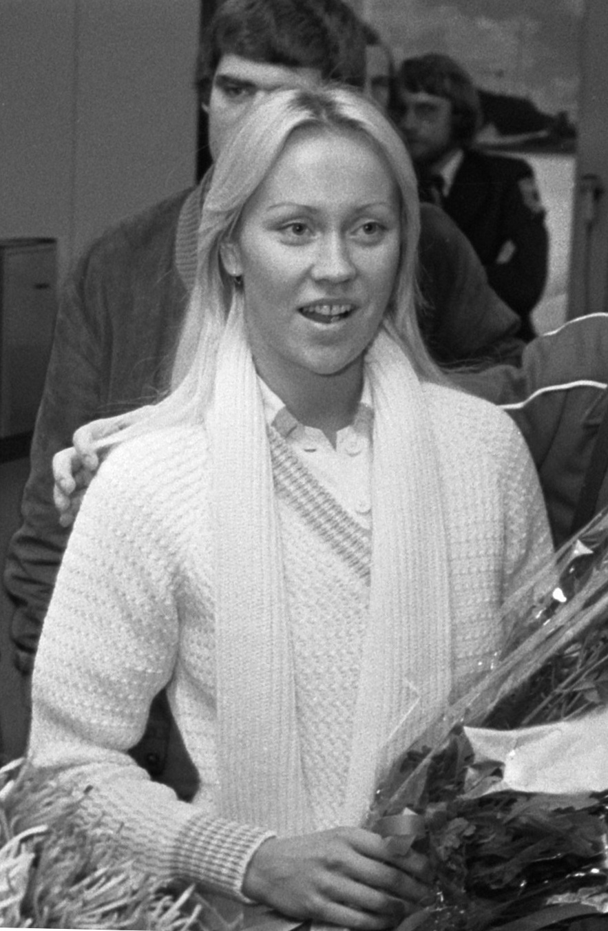 Agnetha Fältskog in Nederland